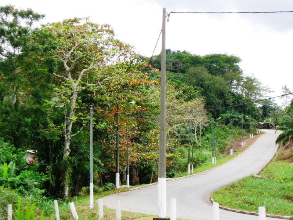 Route verdoyante de Kango